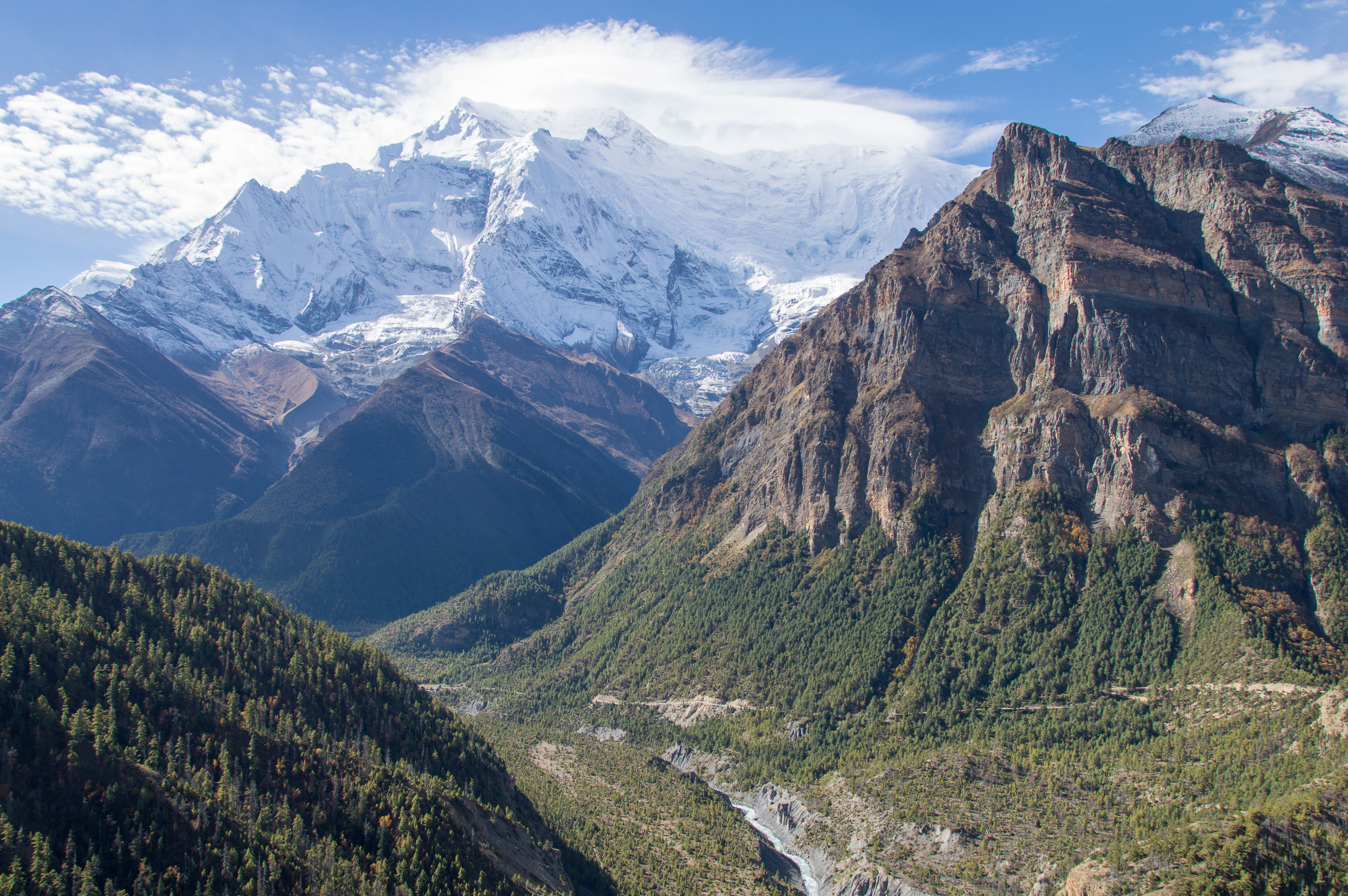 Marsyangdi valley with Annapurna II / Annapurna Circuit, Nepal